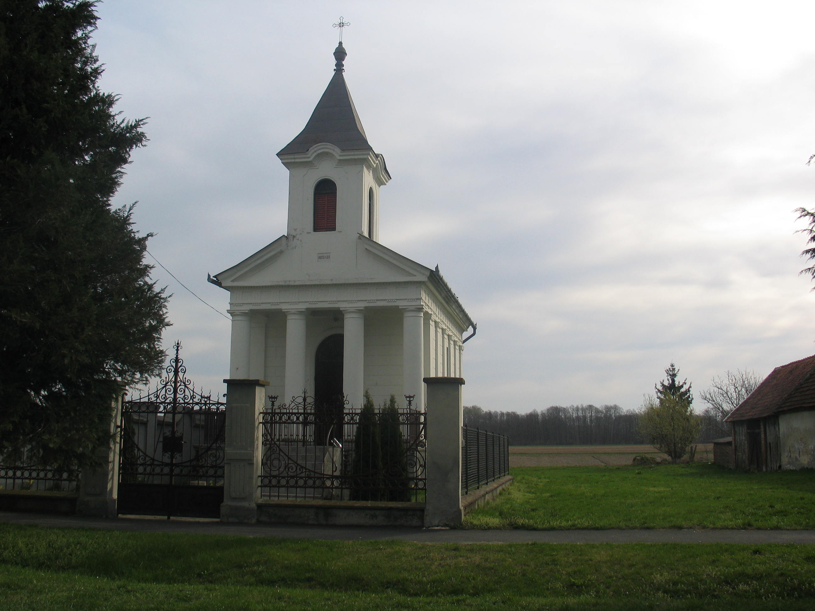 A somogycsicsói Szent Vendel római katolikus templom